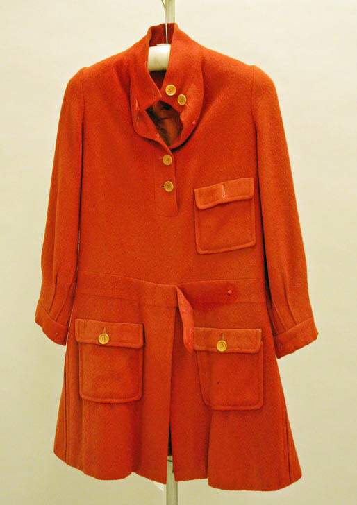 French; Ski jacket